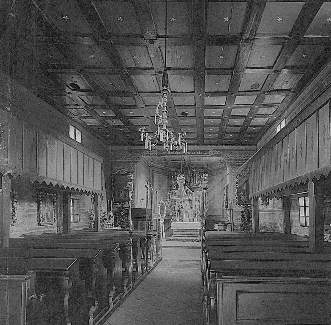 Dřevěný kostel v Kopřivnici, interiér, ca. 1895